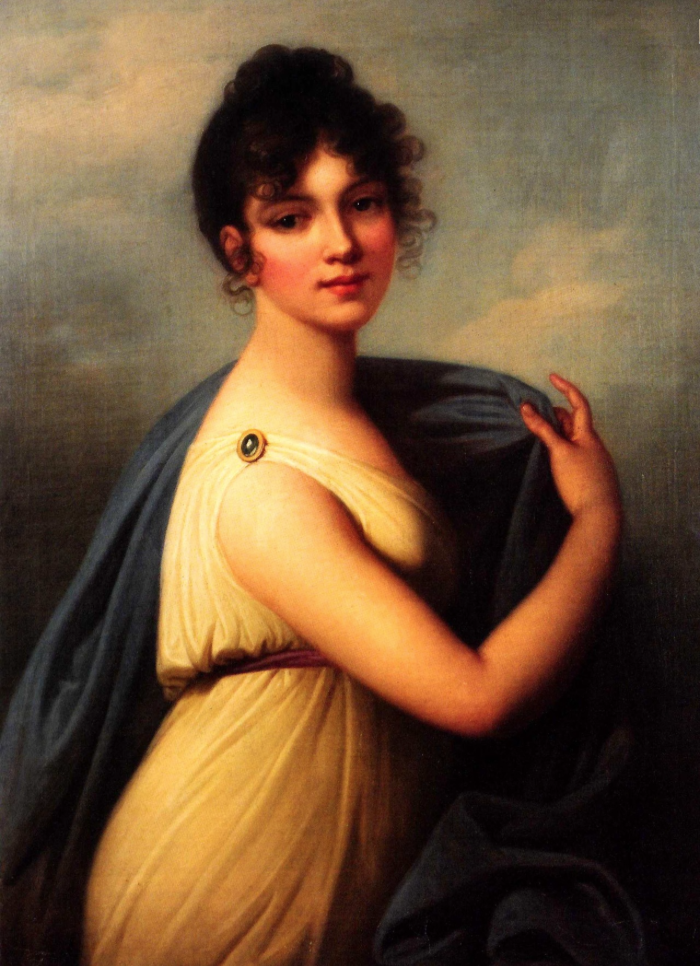 Klementyna z Kozietulskich Walicka